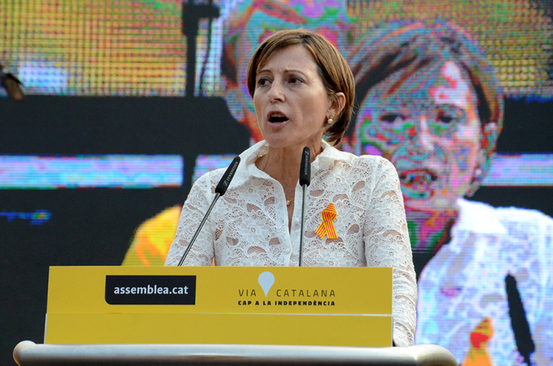 Carme Forcadell. La Via Catalana a Barcelona. Plaça Catalunya.